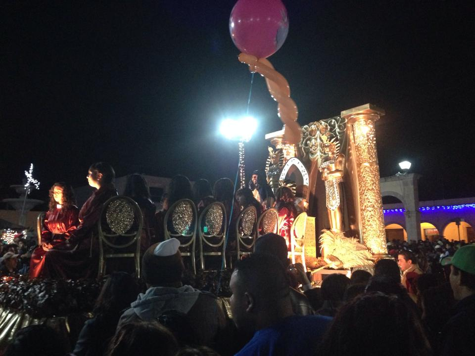 Desfile del Paseo de carros 25 de Diciembre 2013en Uriangato, Gto.